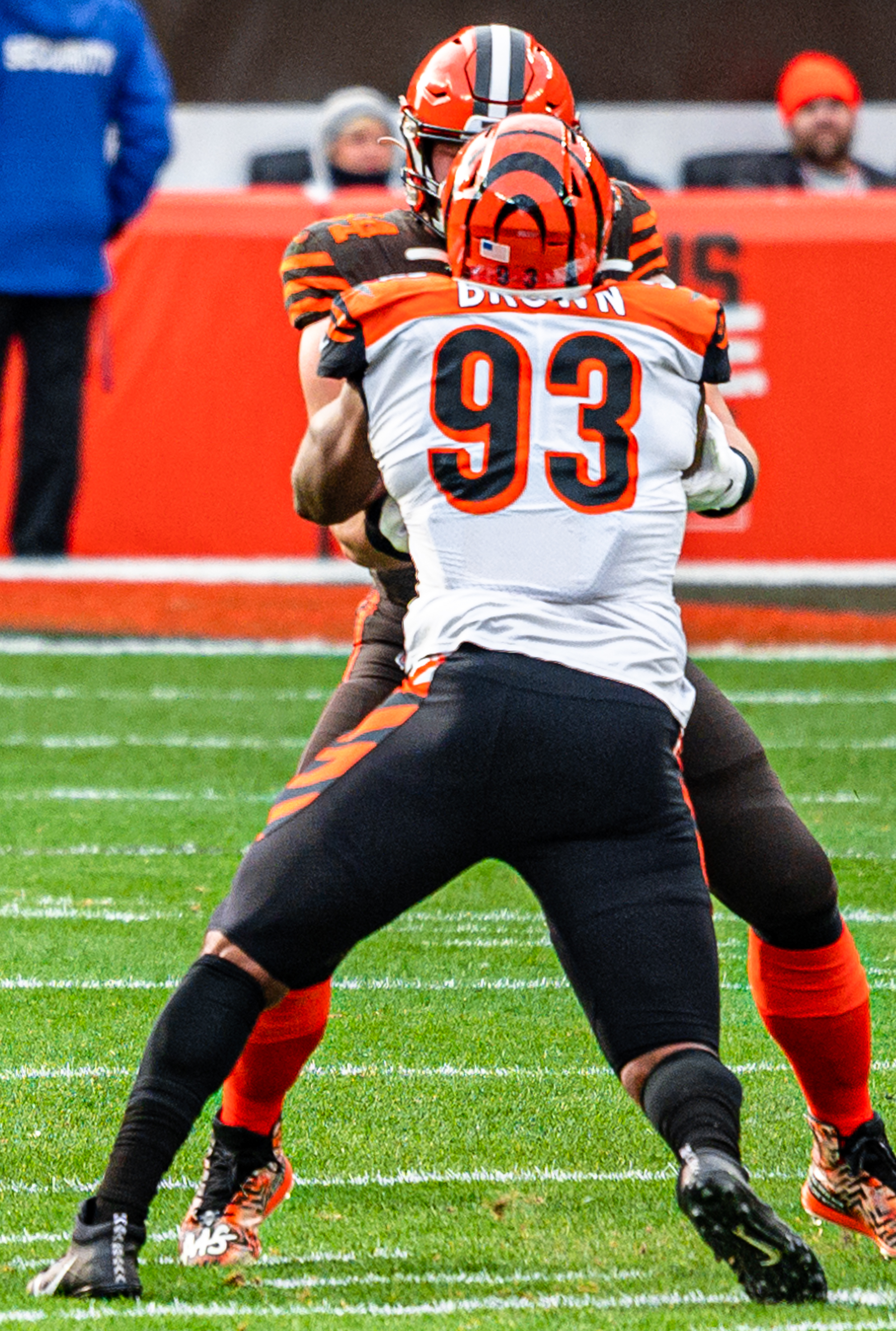 Baker Mayfield